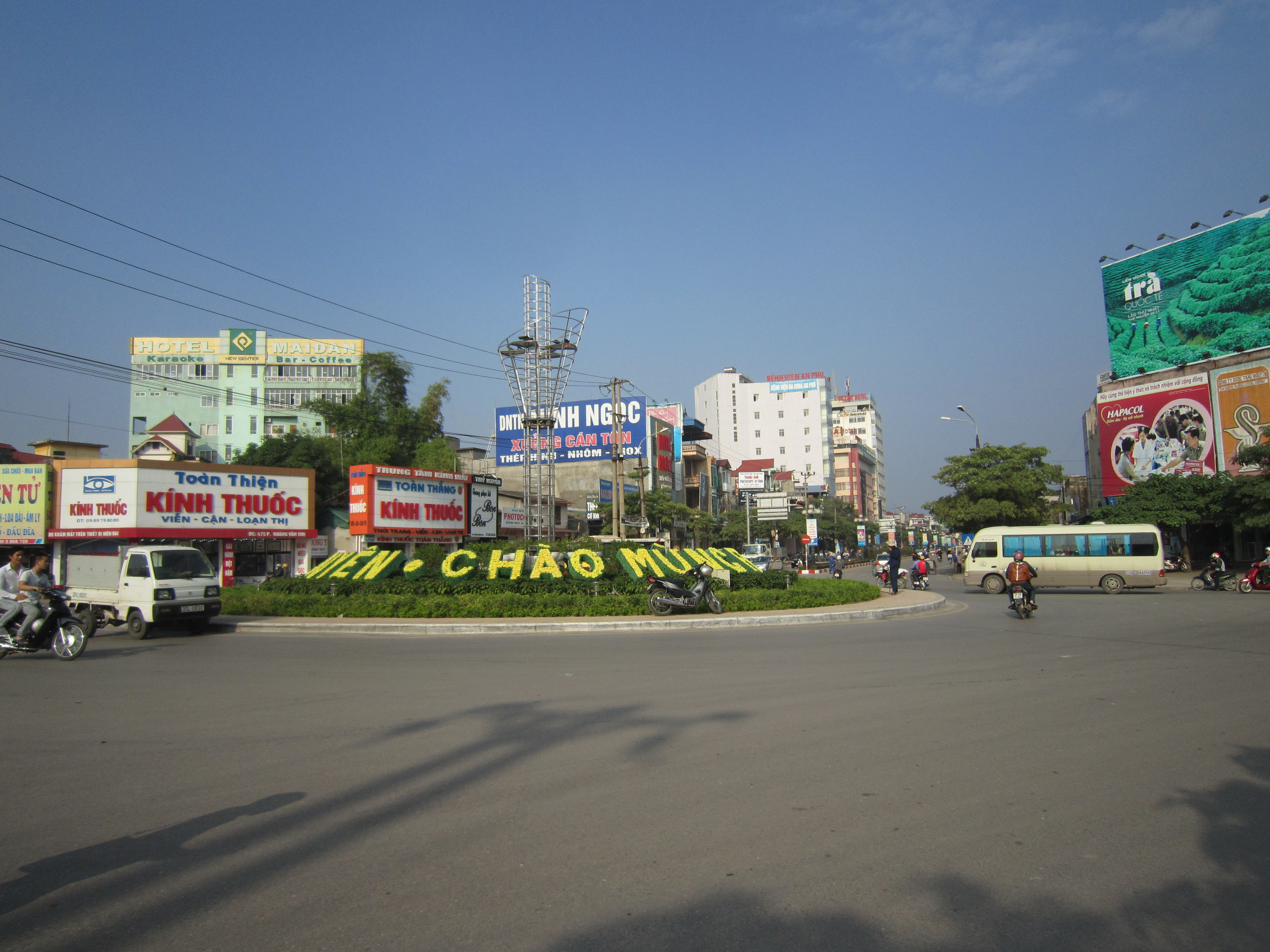 đảo tròn Đồng Quang, thành phố Thái Nguyên